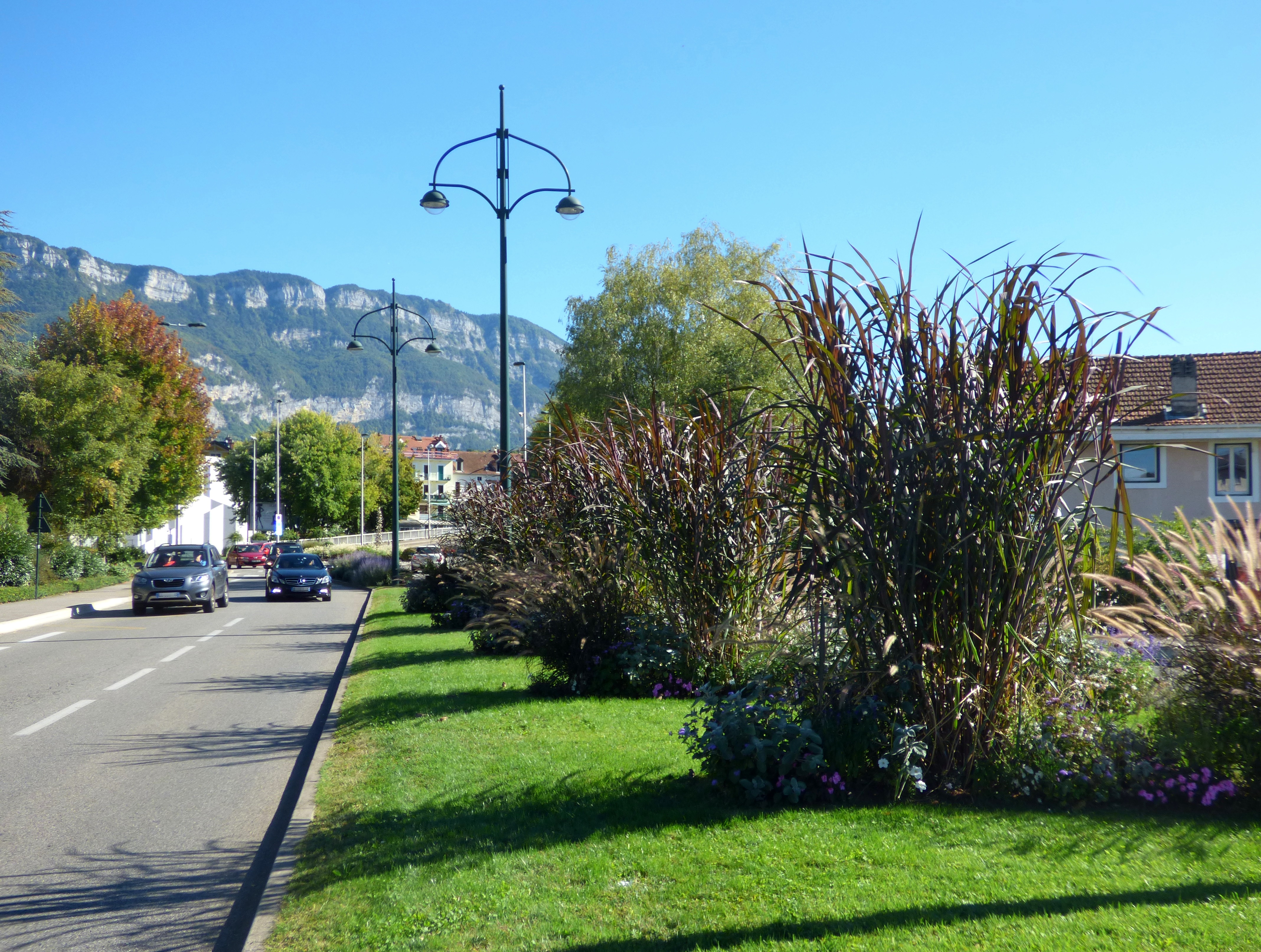 Fleurissement estival 2018 au centre d'une route départementale à Aix-les-Bains (Savoie).